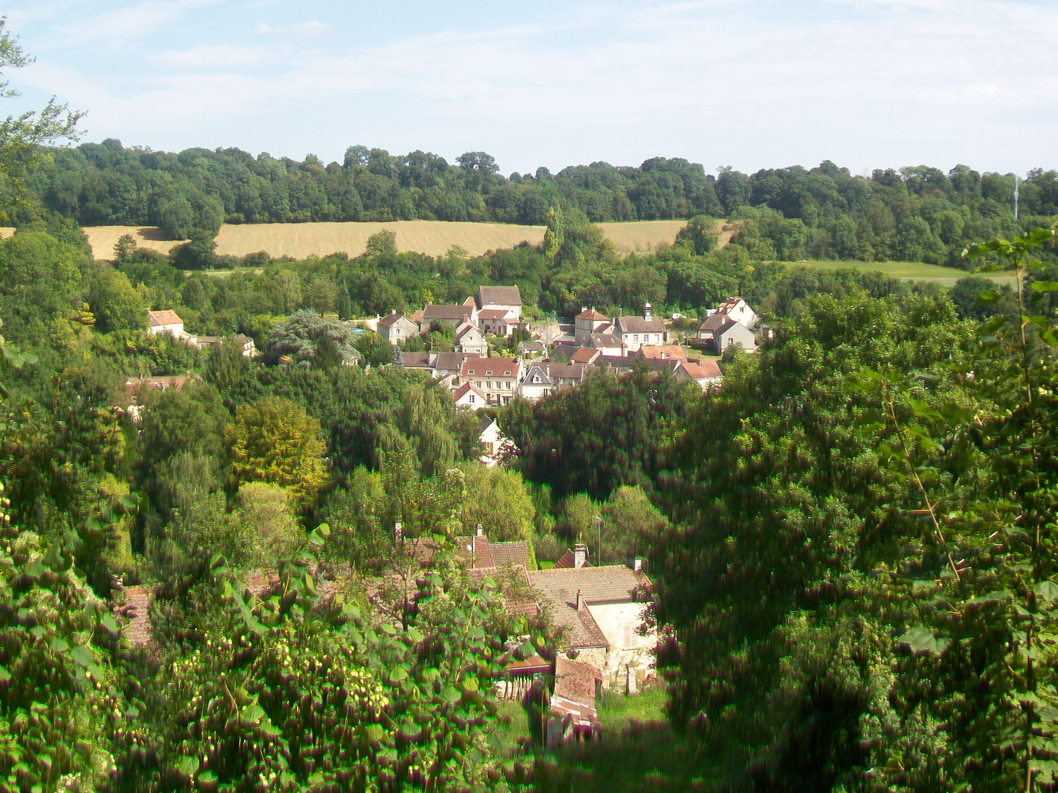 Vue sur le village depuis l'ouest.